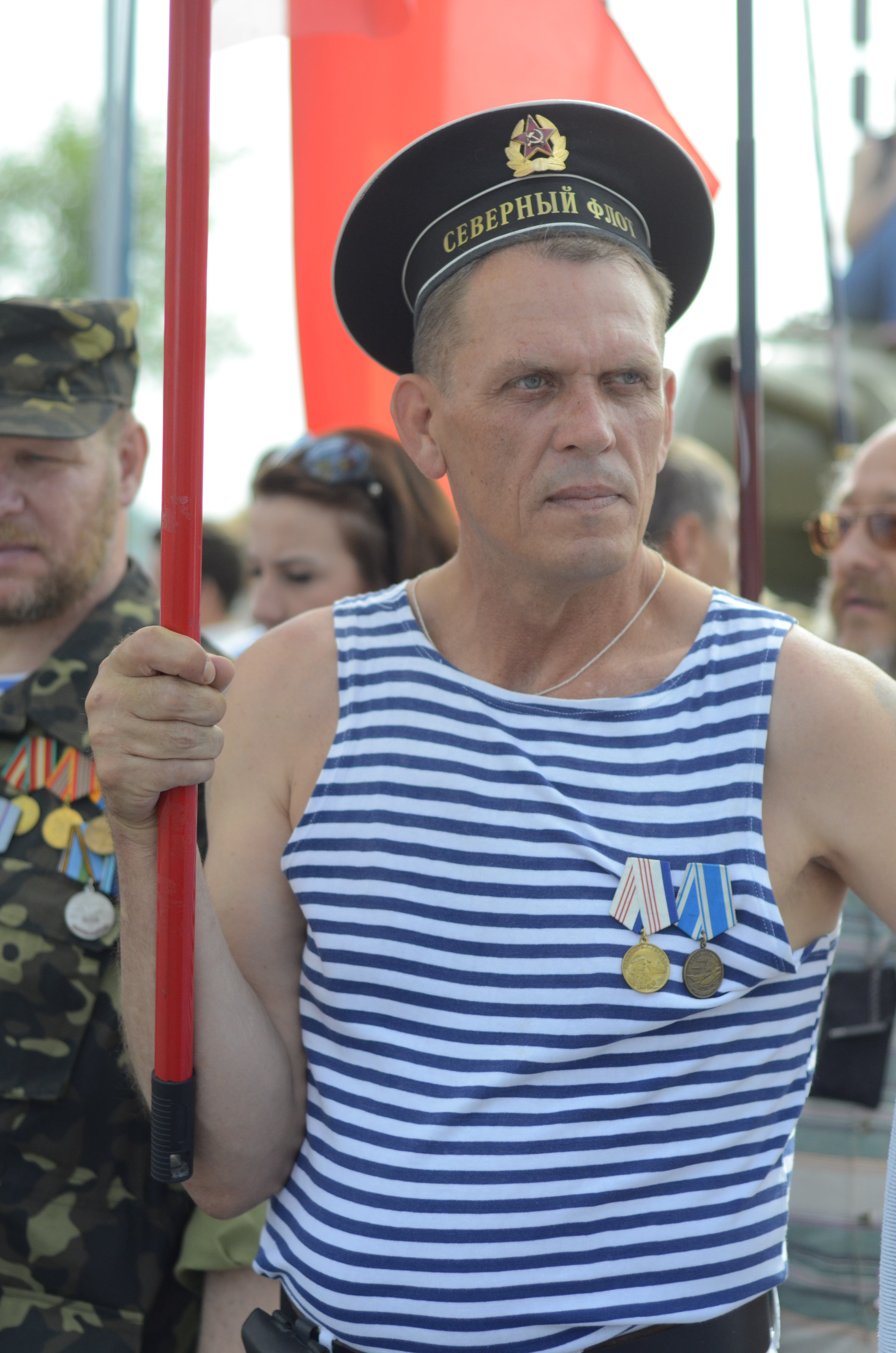 День Победы в Донецке